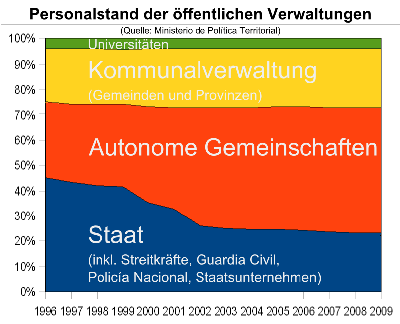 Personalstand der öff. Verwaltungen Spaniens